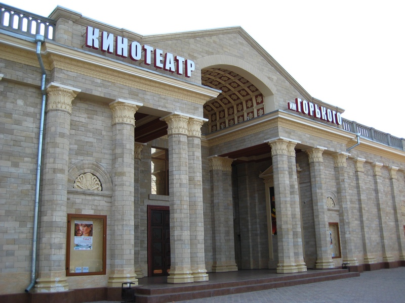 Кинотеатр имени Горького